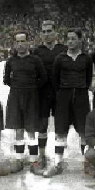 ESCENAS DE LA FINAL DE CAMPEONATO DE ESPAÑA EN EL CAMPO DE ATOTXA ENTRE LOS EQUIPOS DEL REAL UNION Y REAL MADRID (1-0) (18/18). Trabajo derivado. Anatol flanqueado por Errazquin y Echeveste.